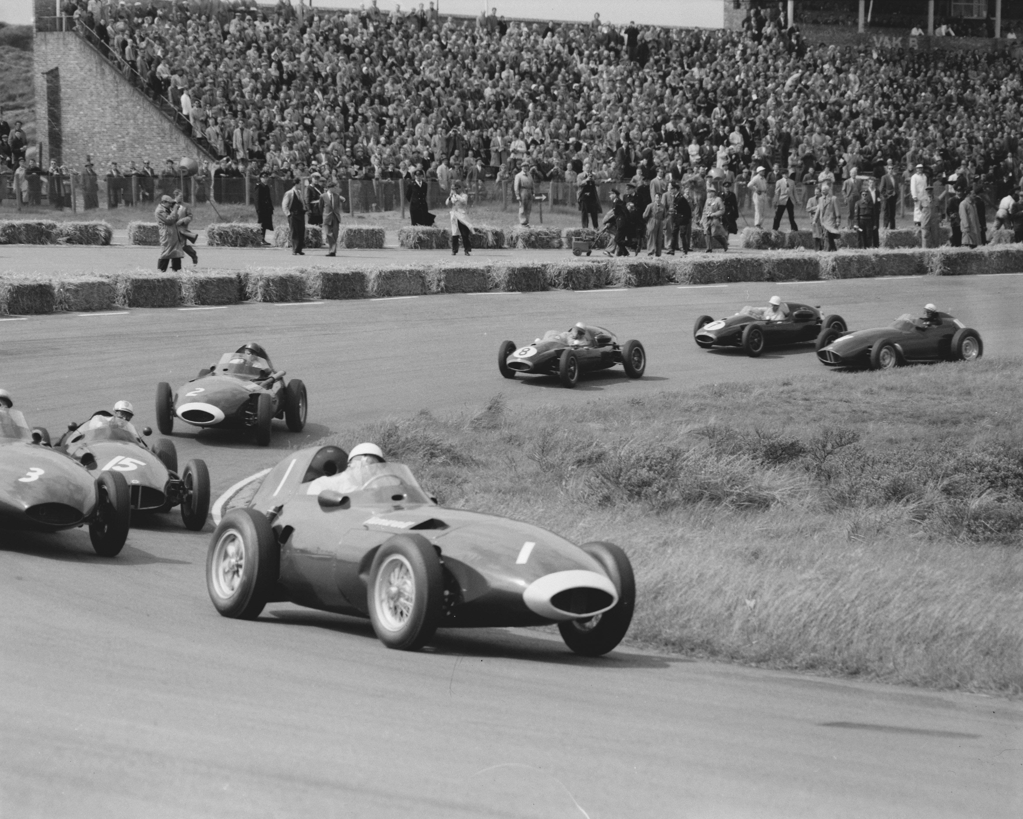 Collectie / Archief : Fotocollectie Anefo Reportage / Serie : [ onbekend ] Beschrijving : "Grote prijs van Nederland" op het circuit van Zandvoort / aangetast Datum : 26 mei 1958 Locatie : Noord-Holland, Zandvoort Fotograaf : Pot, Harry / Anefo Auteursrechthebbende : Nationaal Archief Materiaalsoort : Negatief (zwart/wit) Nummer archiefinventaris : bekijk toegang 2.24.01.04 Bestanddeelnummer : 909-5854